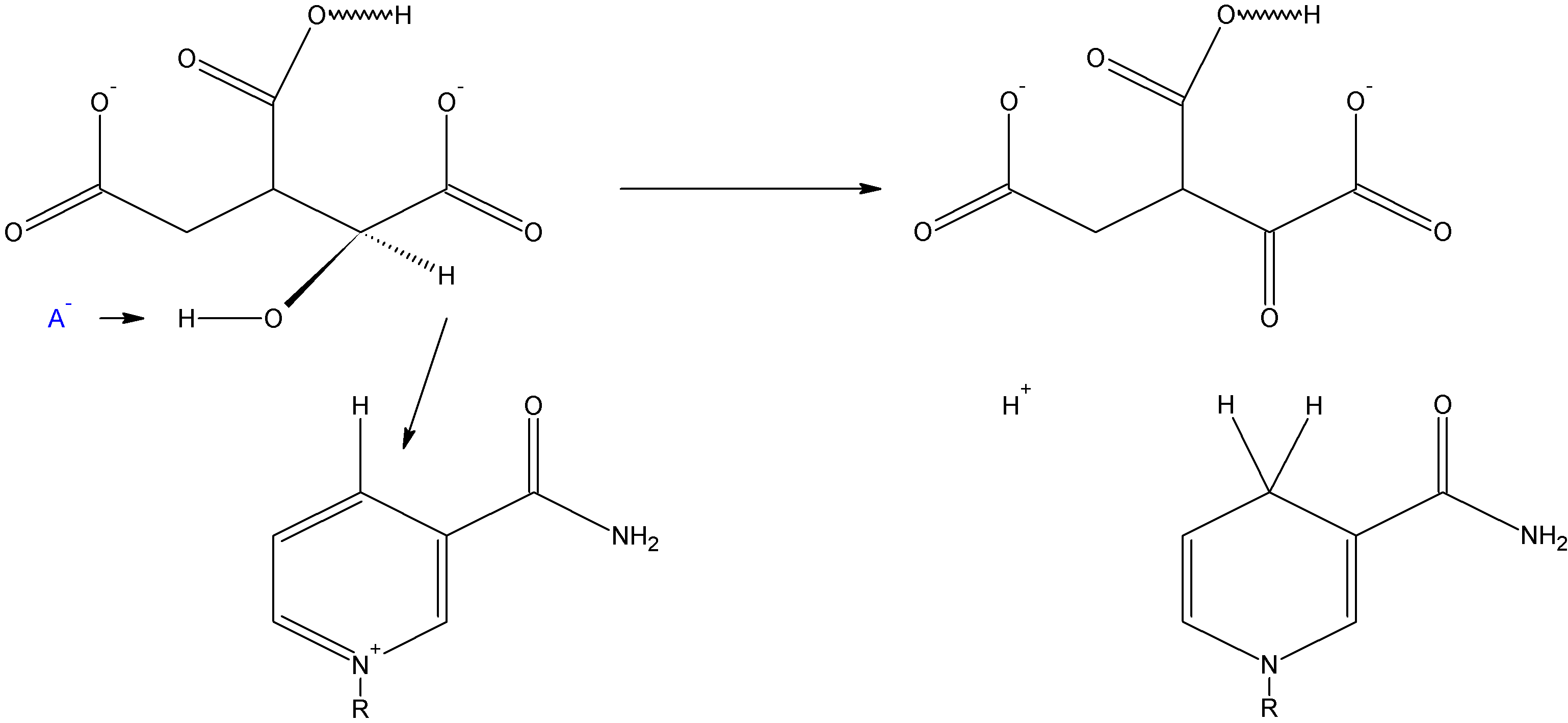 Primera etapa de la reacción catalizada por la IDH. Realizado con ACD/ChemSketch.